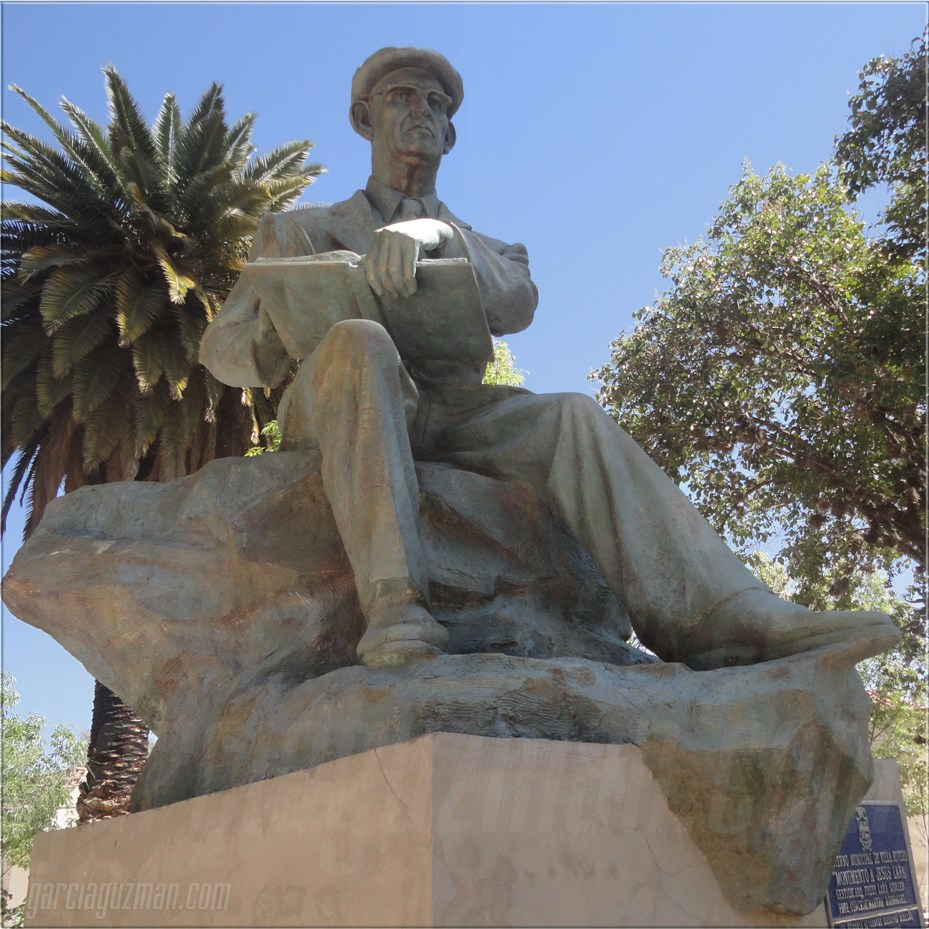 Escritor Cochabambino